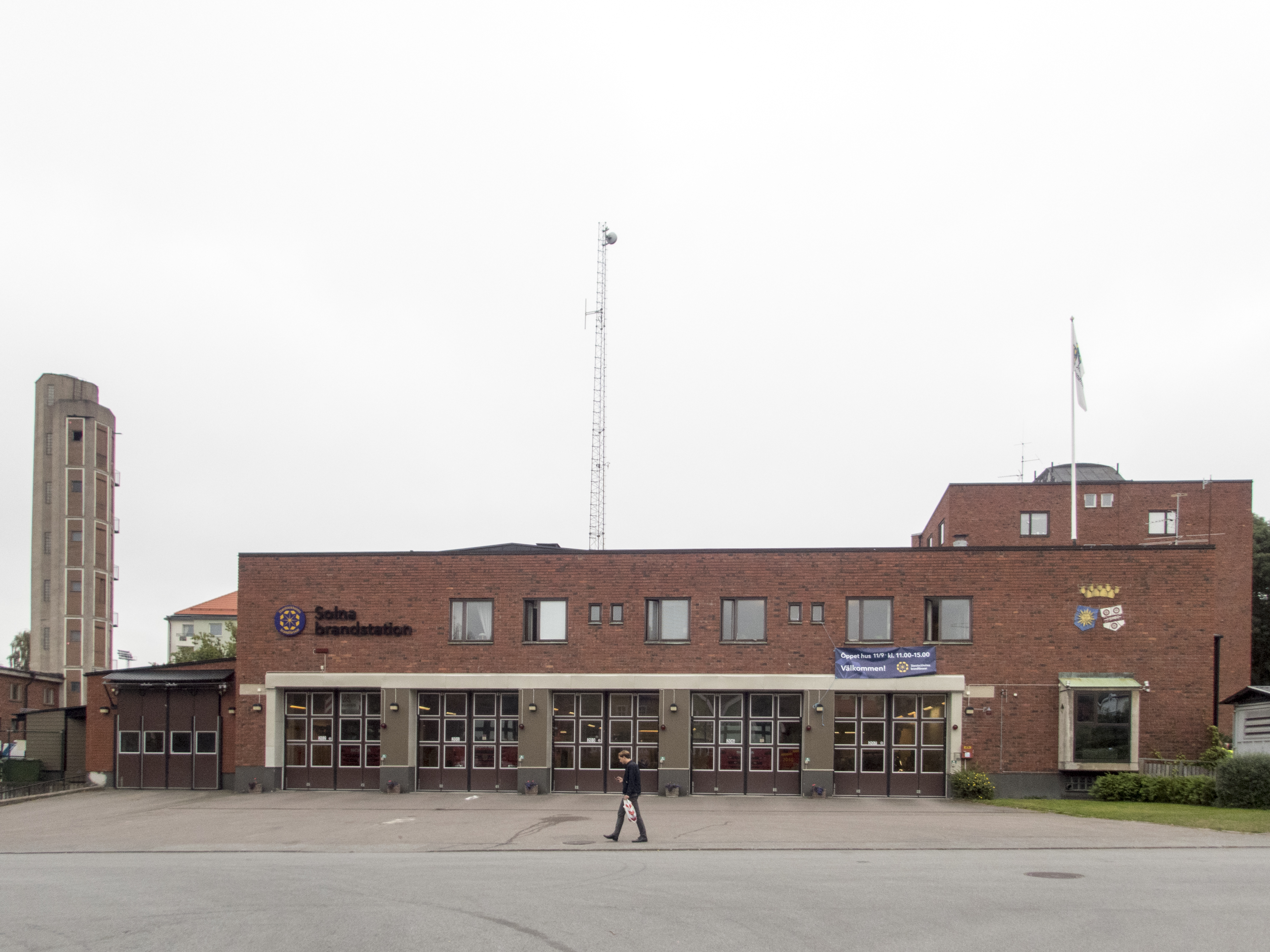 Solna brandstation, Ekensbergsvägen 87. Invigd 1957 av Solna-Sundbybergs brandförsvarsförbund. Arkitekt Georg Scherman. År 2004 - 2005 renoverades stationen och återinvigdes i maj 2005.